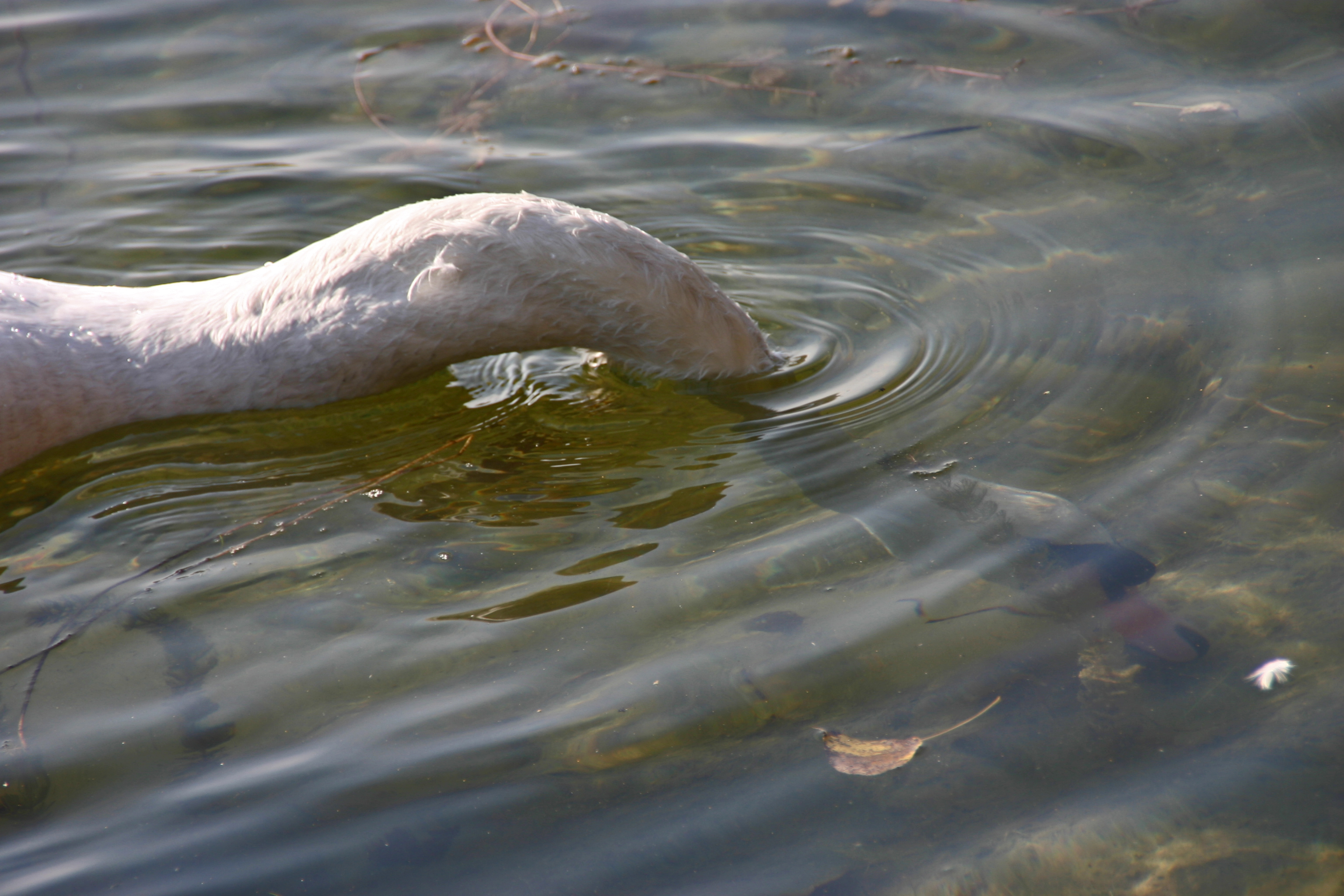 Schwan Cygnus olor beim Gründeln... die sparsame Variante "ohne Schwänzchen in die Höh´" bei uns am See. Diesmal noch als Nahaufnahme nur Hals und Kopf unter Wasser.